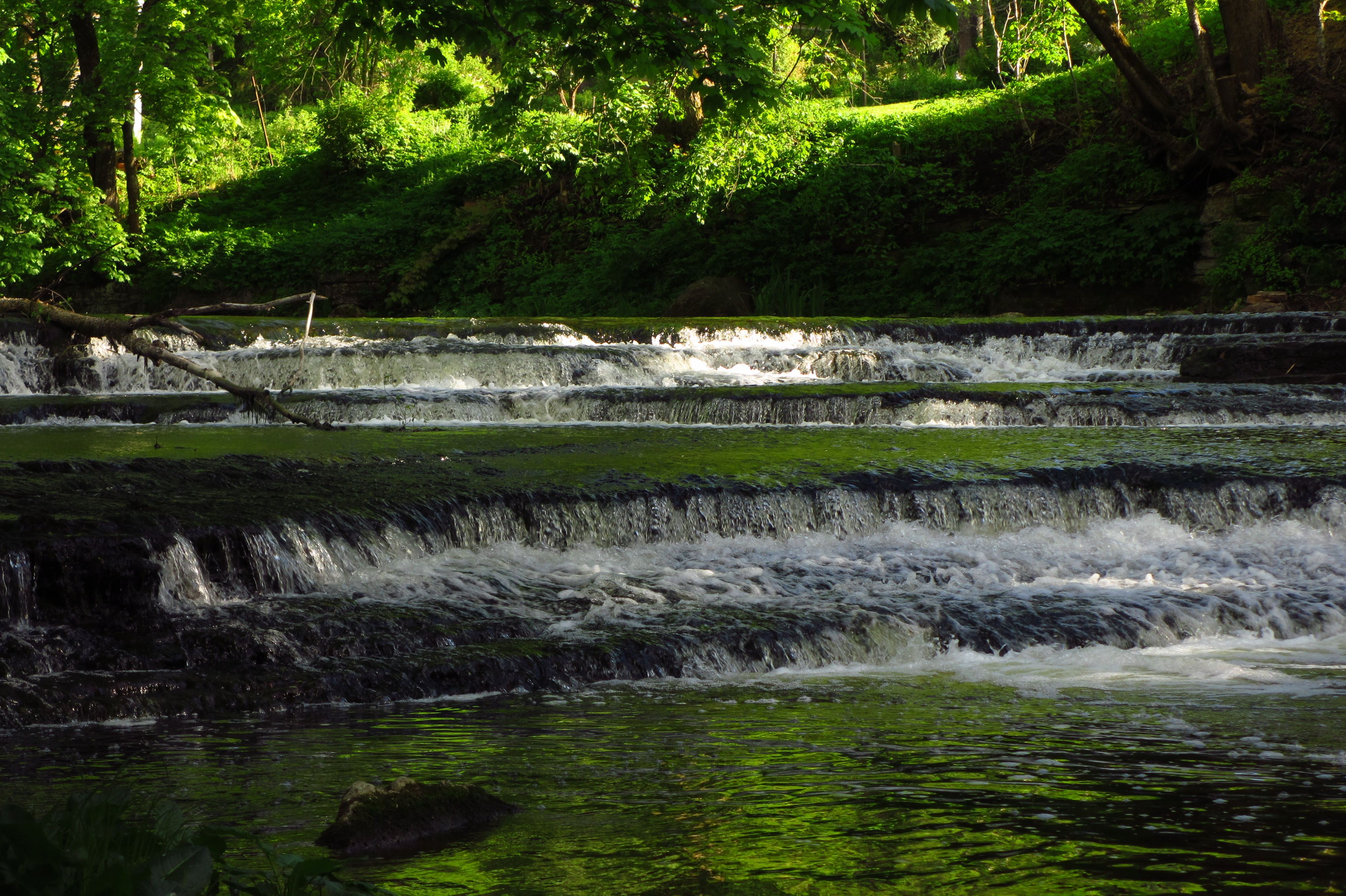 Joaveski juga Loobu jõel Lahemaa rahvuspargis